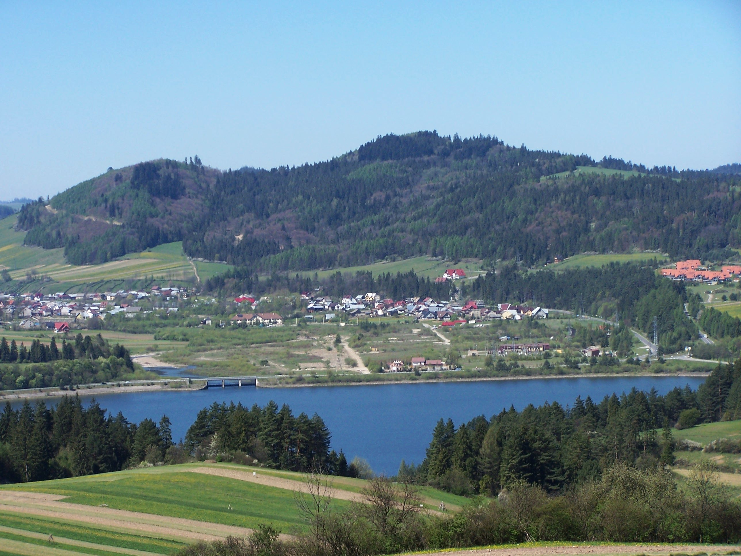 Zbiornik Sromowski i Niedzica. U góry Pieniny Spiskie: Hombark i Cisówka.